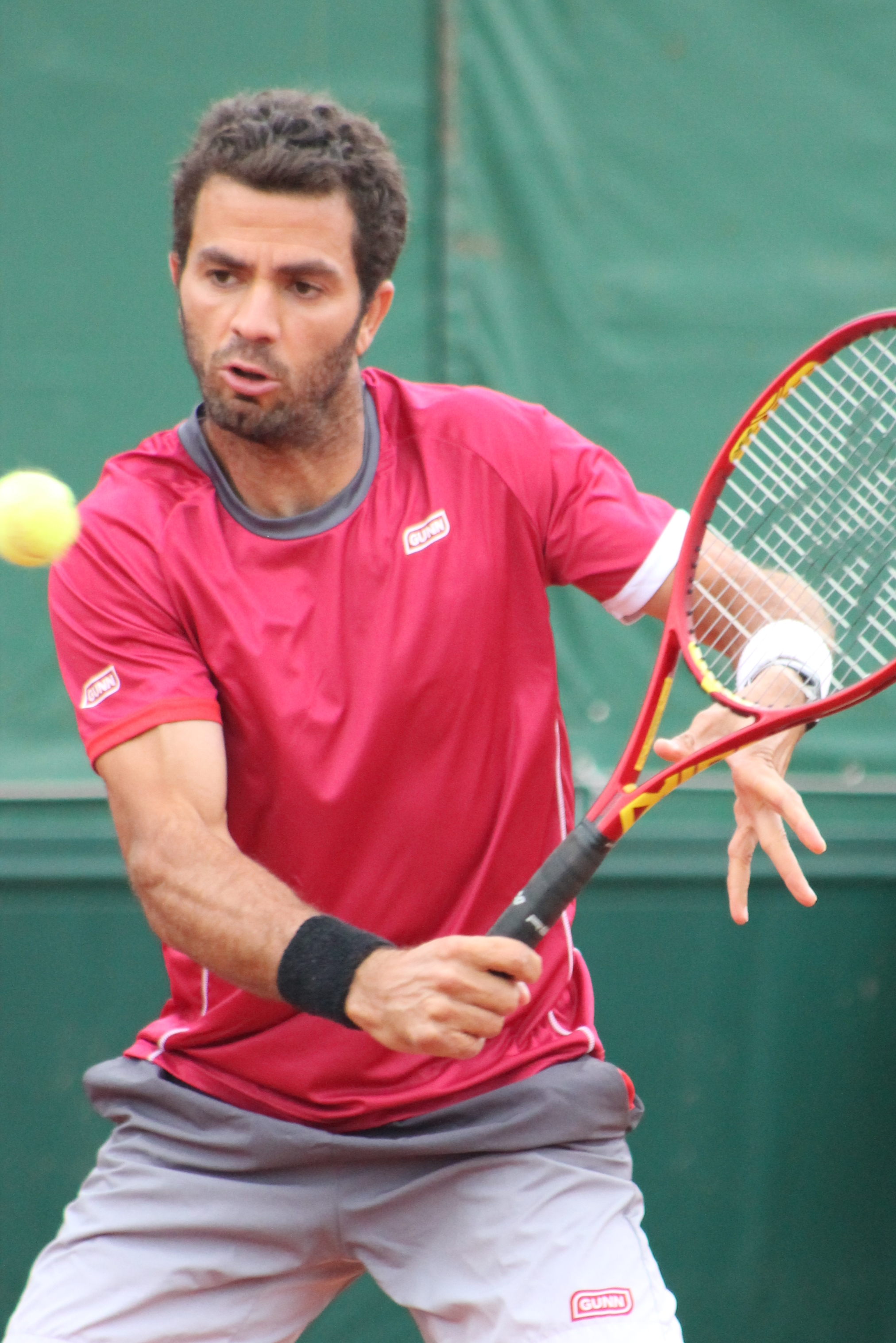 Rojer RG15 (7)